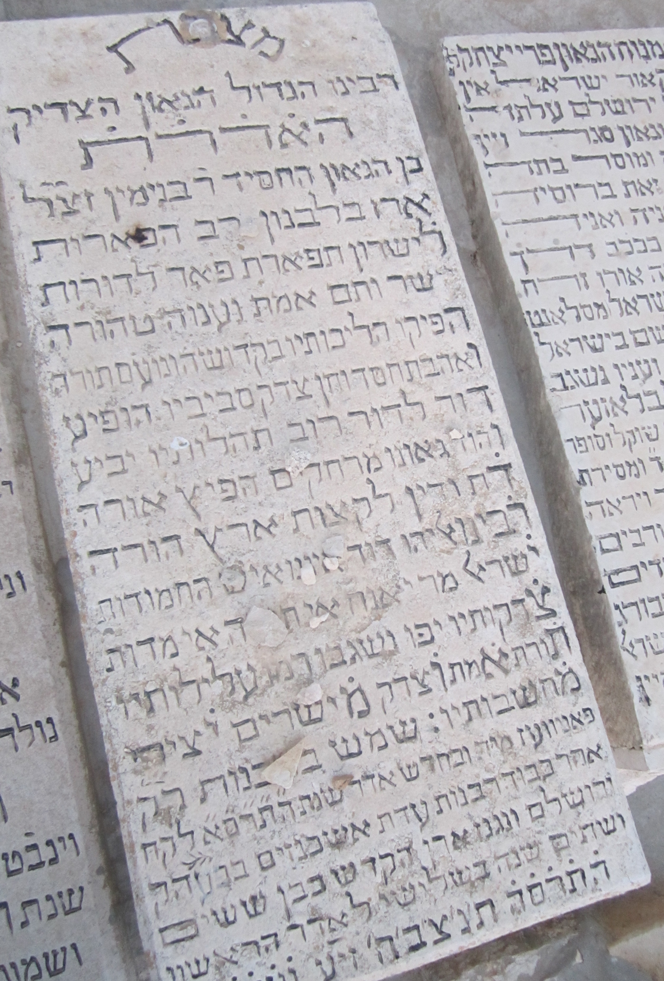 קבר הרב אליהו דוד רבינוביץ' תאומים - האדר"ת